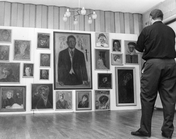 Aage (Åge) Fredslund Andersen (født 7. juni 1904, død 27. april 1976) var dansk fotograf og maler . Udstilling af Aage Fredslund Andersens billeder på Aarhus Rådhus i 1964